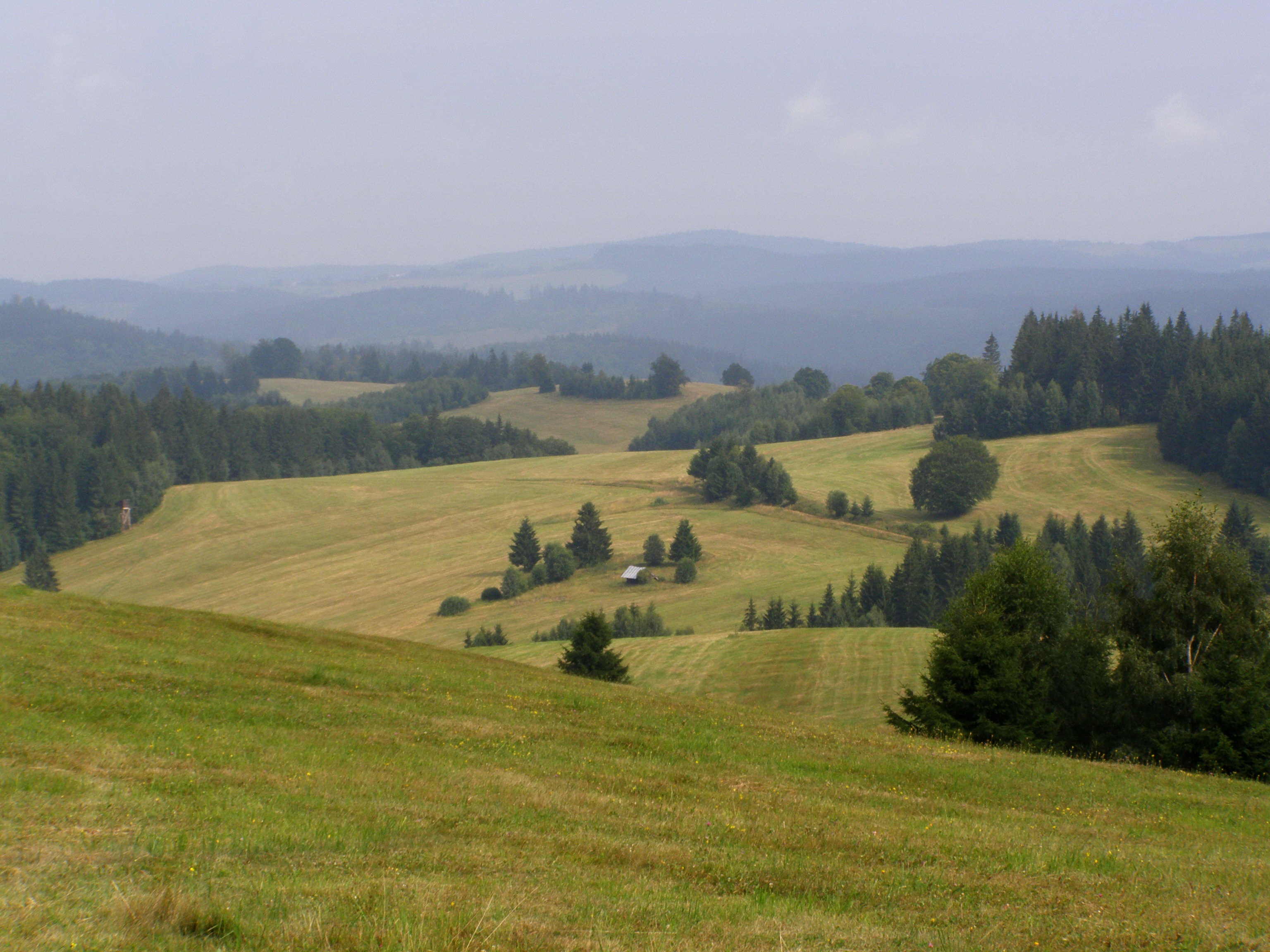 Česky: Slovenské rudohoří, Veporské vrchy, Balocké vrchy, pohled z vrcholu Zákľuky (1012 m) na sever